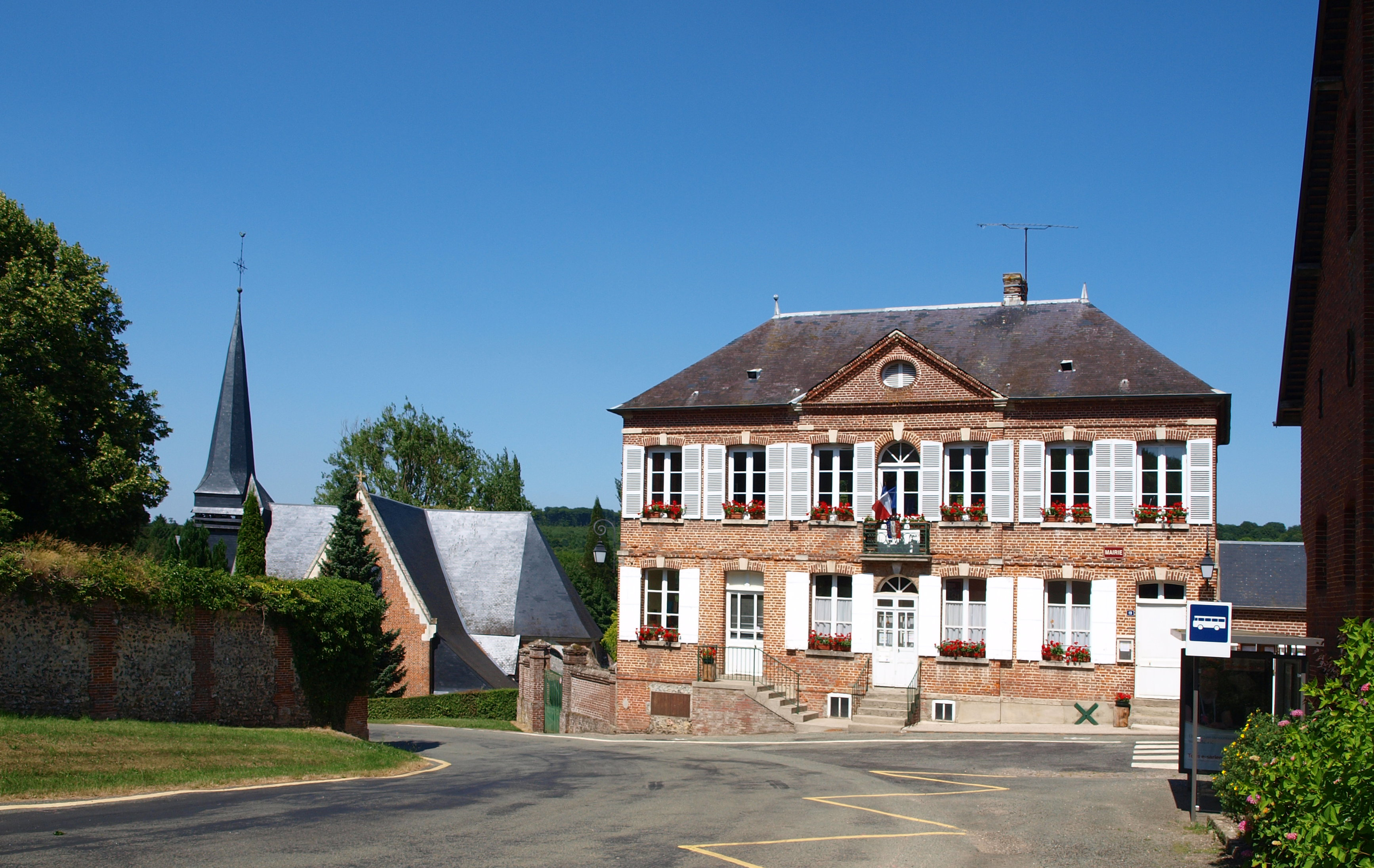 Achy (Oise, France) ; mairie & église